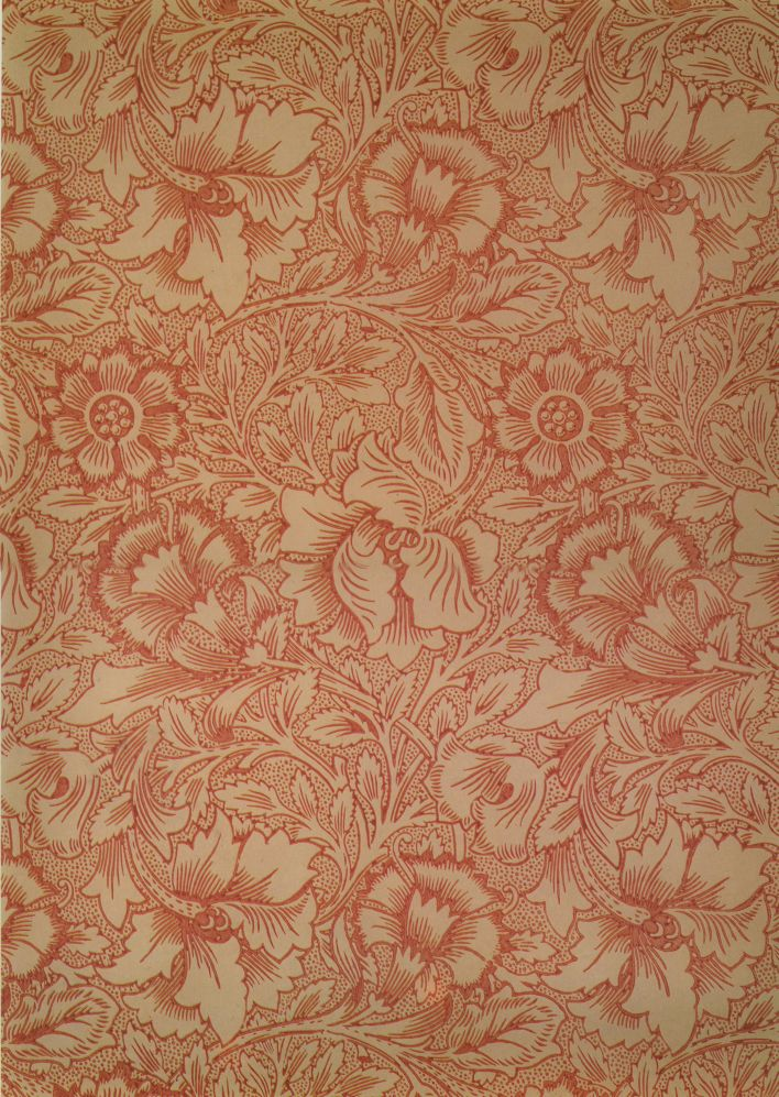 Wallpaperdesign van William Morris.